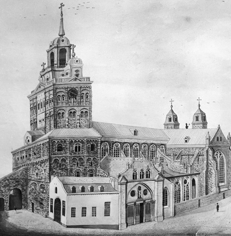 Maastricht, Sint Servaasklooster & Henric van Veldekeplein (enigszins vertekend beeld): Spijker (graanschuur van het kapittel), Sint-Servaaskerk met westwerk en Bergportaal en Sint-Janskerk. Tekening van Ph. van Gulpen (midden 19e eeuw).